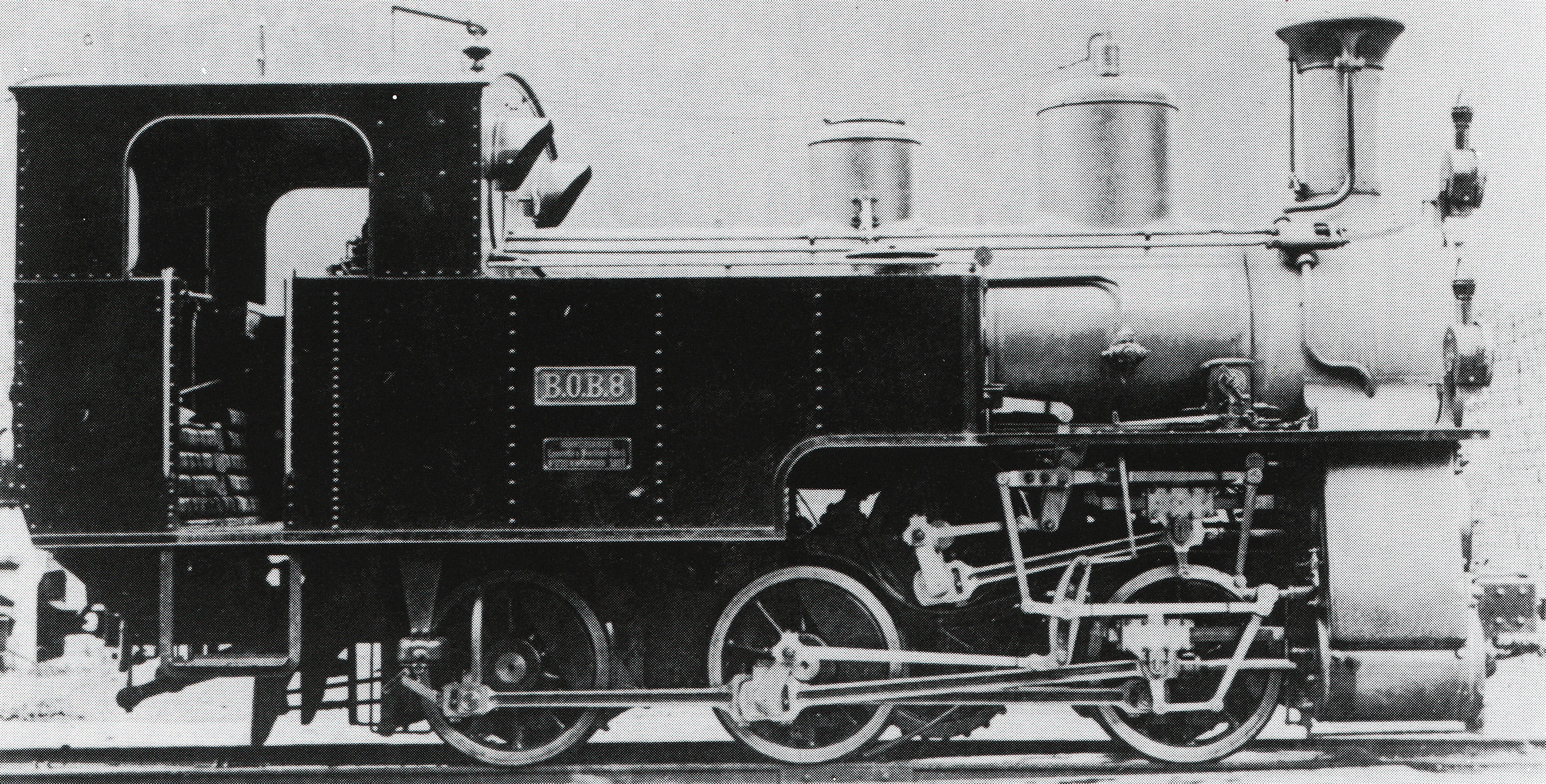 Zahnradlocomotive (Syſtem Riggenbach) HG 3/3 Nr. 8 der Berner Oberland-Bahn, gebaut 1906 inn der Schweizeriſchen Locomotiv- und Machines-Fabrique zů Winterthur (Fabr.-Nr. 1729), 1917 von der SLM auf 950 mm Spurweite umgebaut, auf Zahnradſyſtem Strub umgrüſtet und zum Betrib auf der Strecke Spezzano Albaneſe—Lagonegro als Nr. 262 an die Italieniſchen Südbahnen verkauft, 1960 außer Dienſt geſtellt und anſchließend abgebrochen.